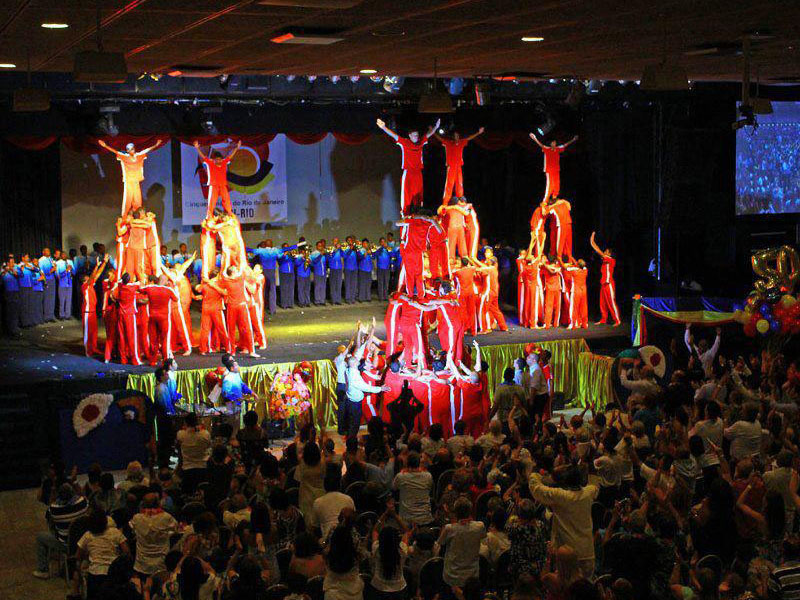 Tower Rio50